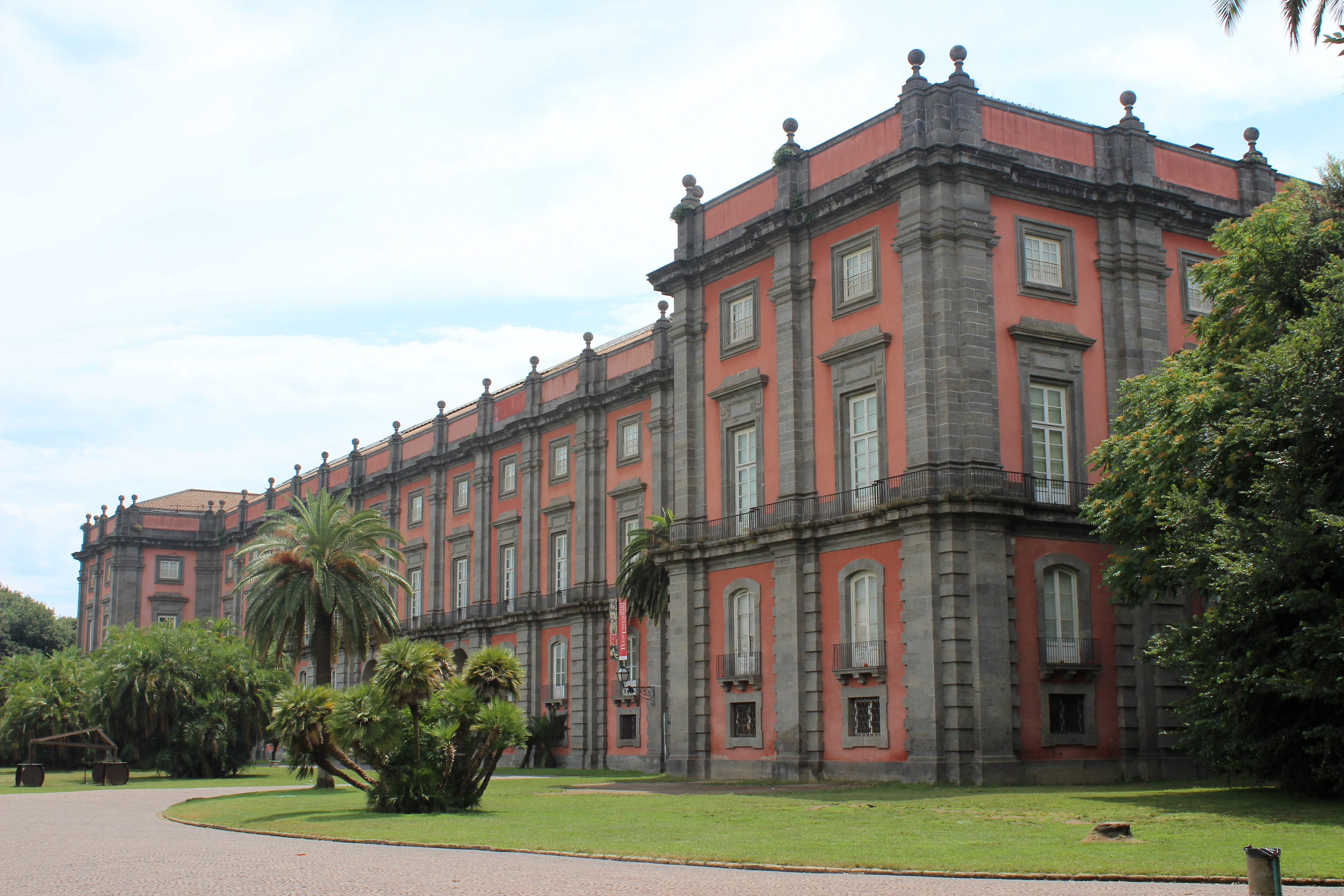 Palacio de Capodimonte. Nápoles.